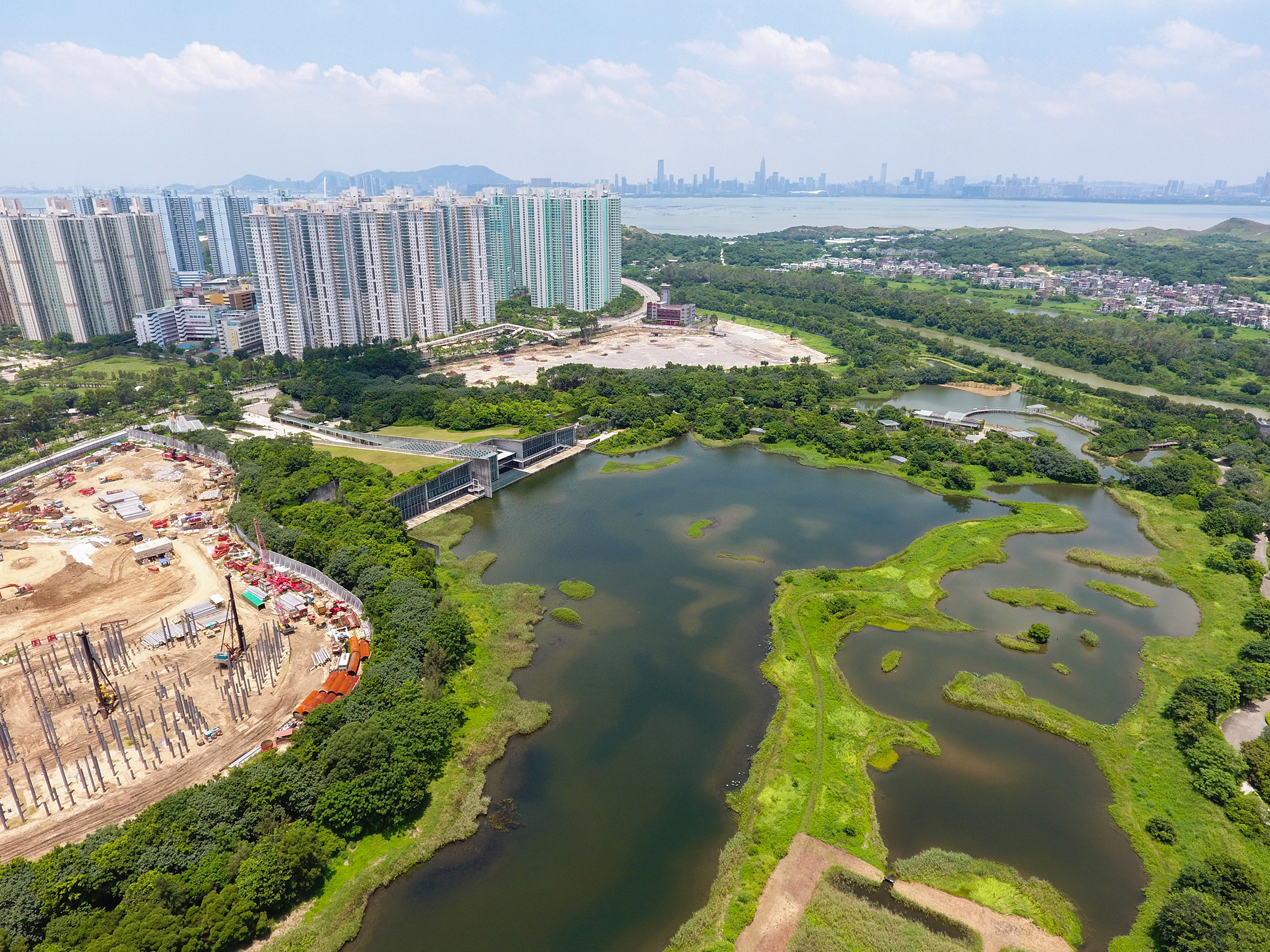 Hong Kong Wetland Park Overview